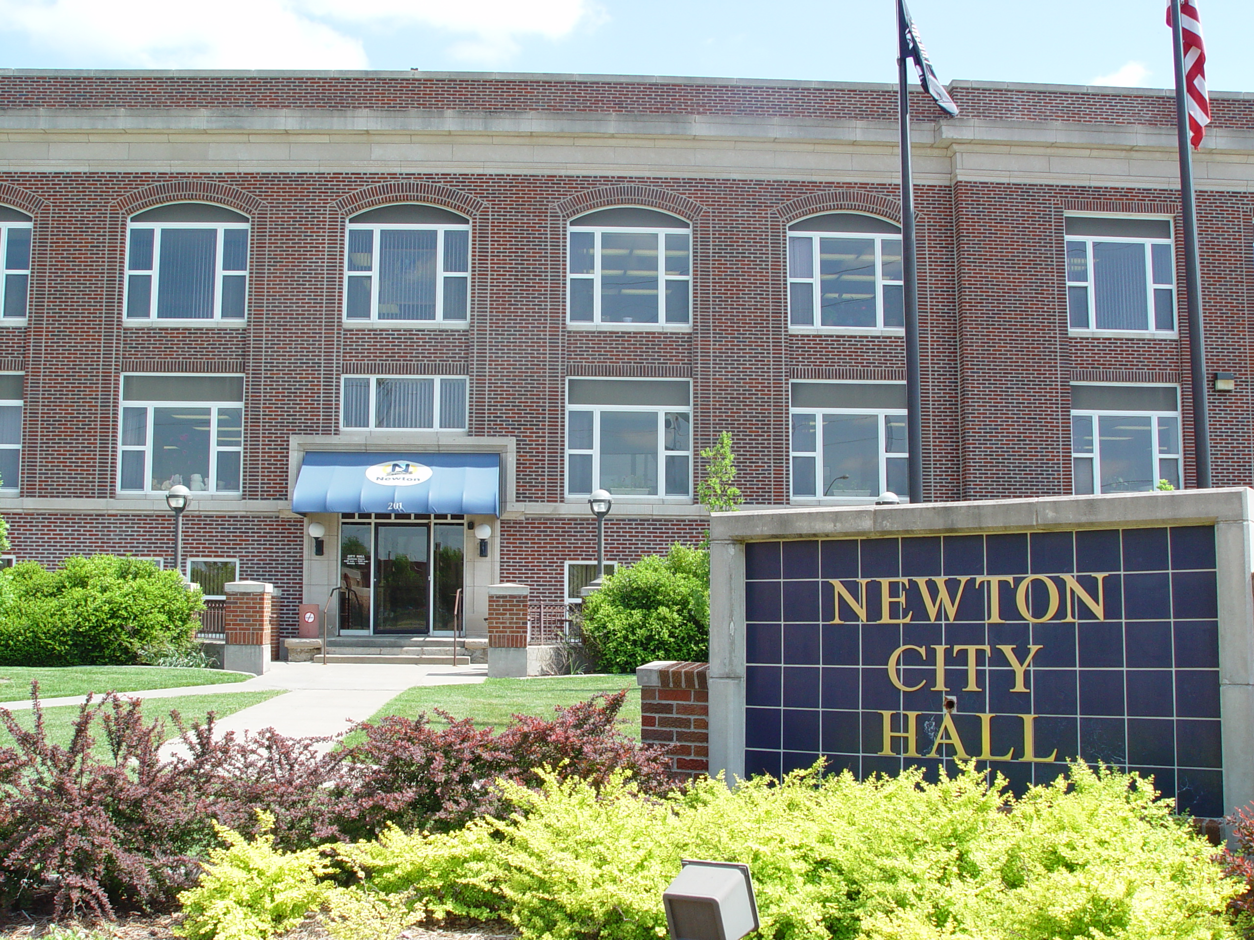 hhkkkhhhhh